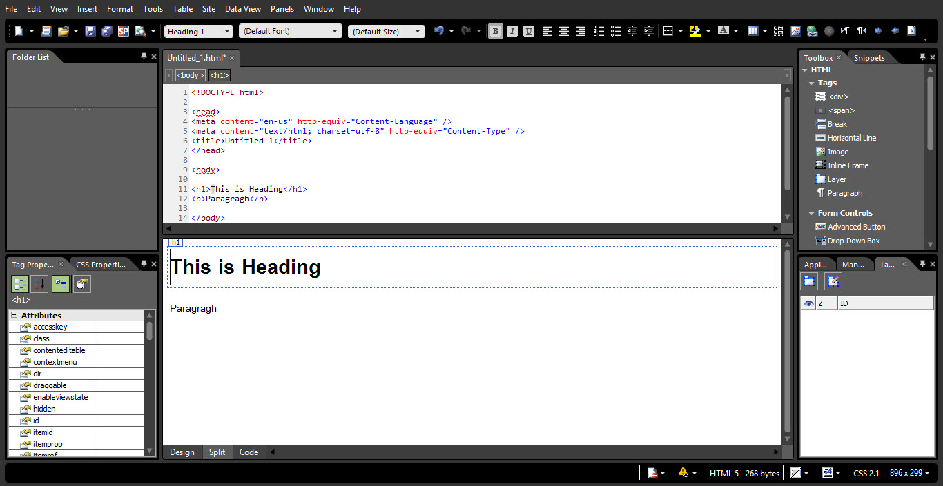 مایکروسافت اکپرشن وب 4